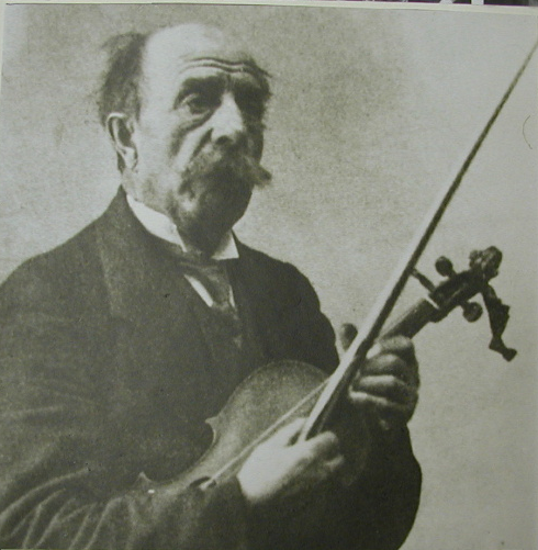 Portrettfoto. Eldre mann med bart og fiolin. Foto: Bredstrøm, Alvdal, Norge.